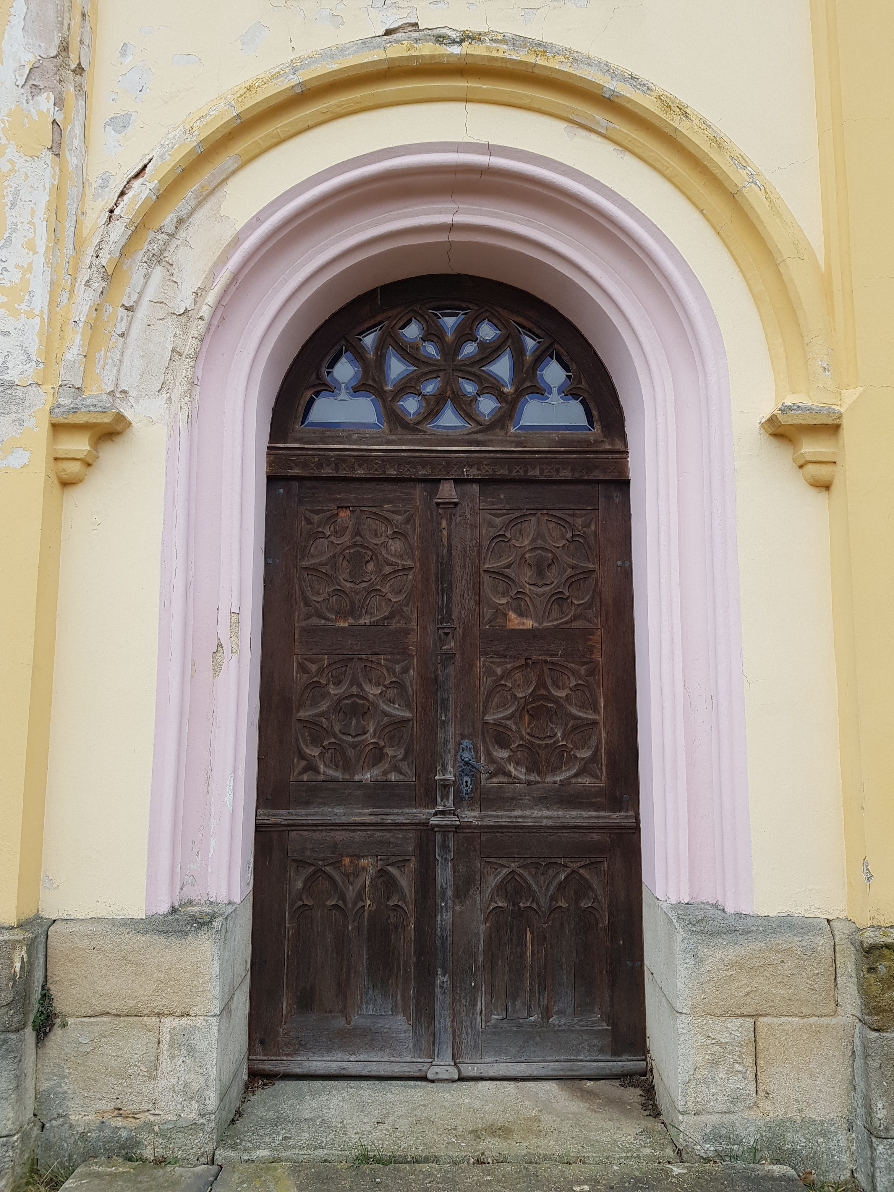 Portál hrobky rodu Mensdorff-Pouilly neboli pohřební kaple sv. Terezie, Hrad Nečtiny, obec Nečtiny